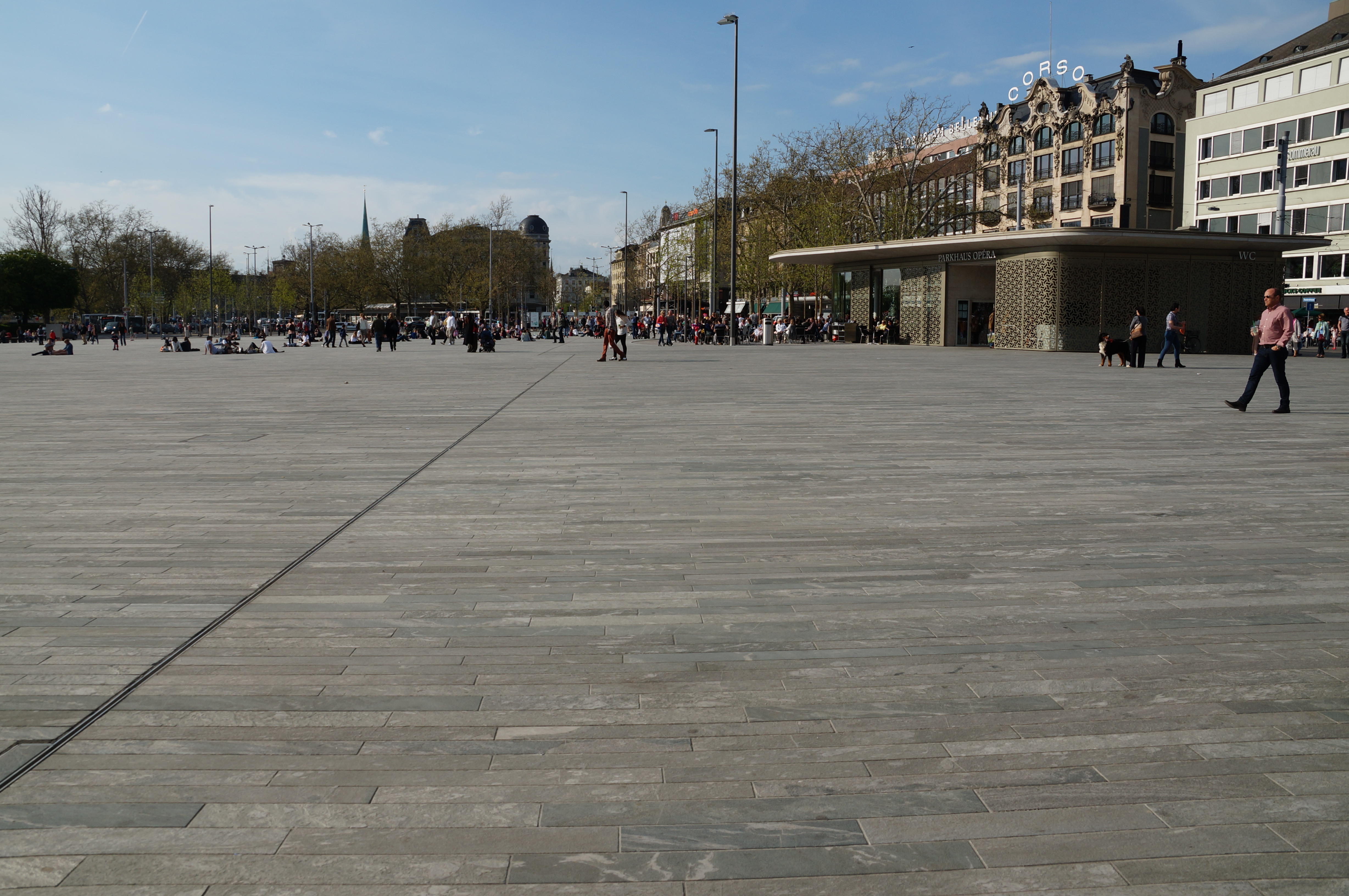 Zürich: Sechseläutenplatz – vom Opernhaus zum Bellevue